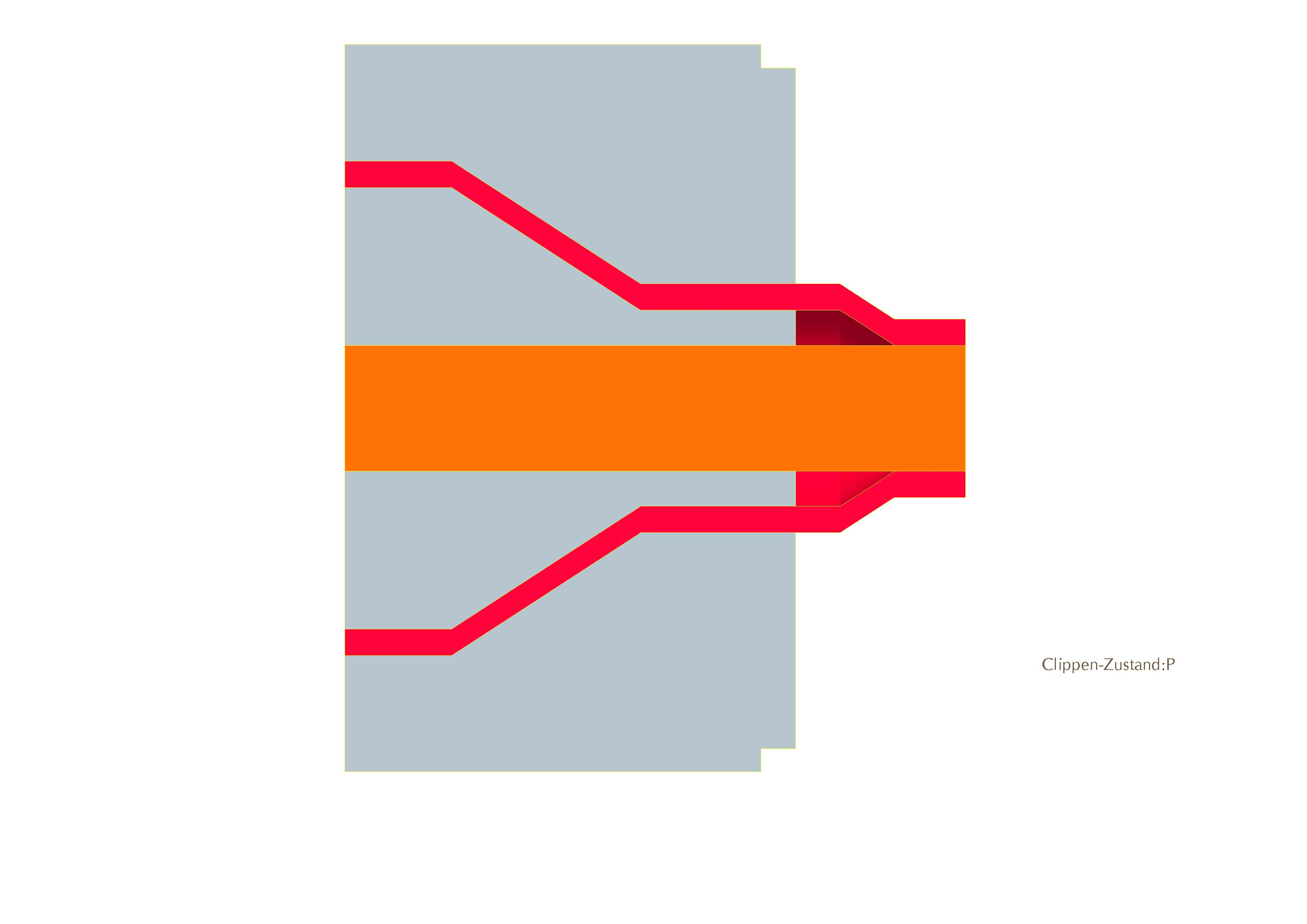 Schlauchummantelung